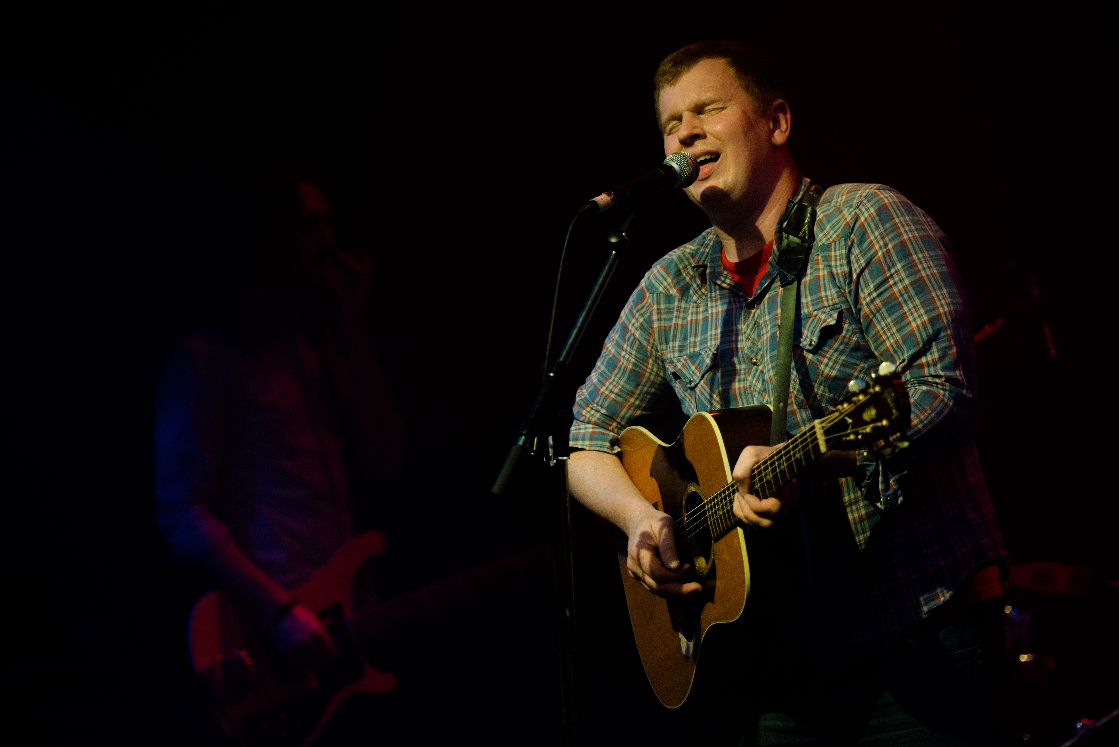 de The Builders and Butchers 2014 Muenchen Kranhalle